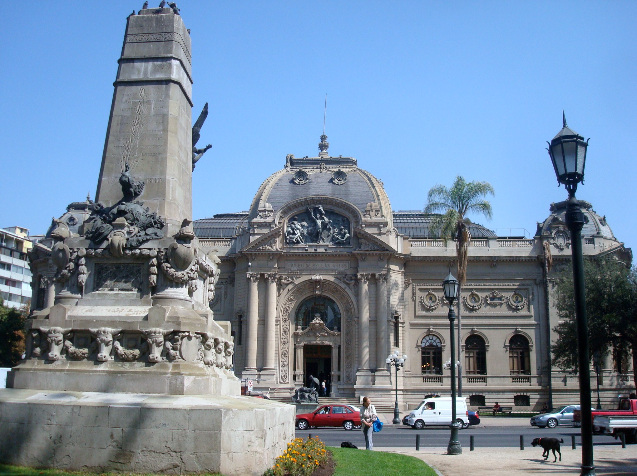 Museo Nacional de Bellas Artes, Santiago Centro, Chile